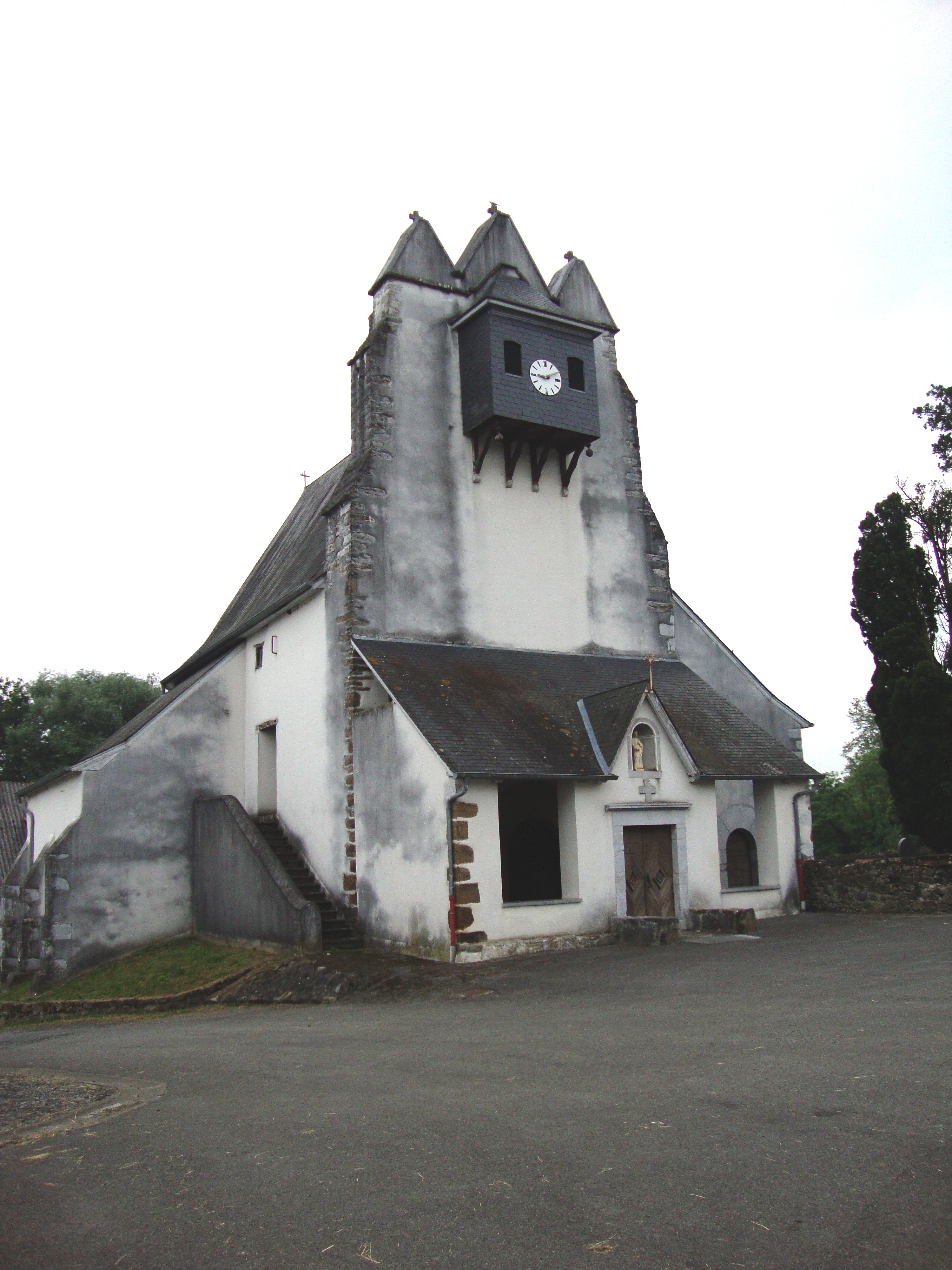 Idaux (Idaux-Mendy (Pyr-Atl, Fr) trinitarian church.